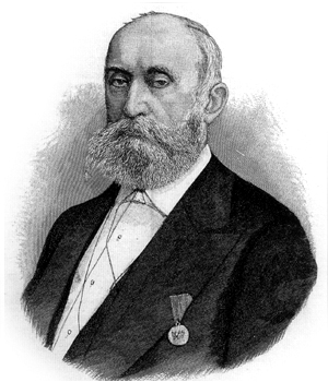 Ґалаґан Григорій Павлович